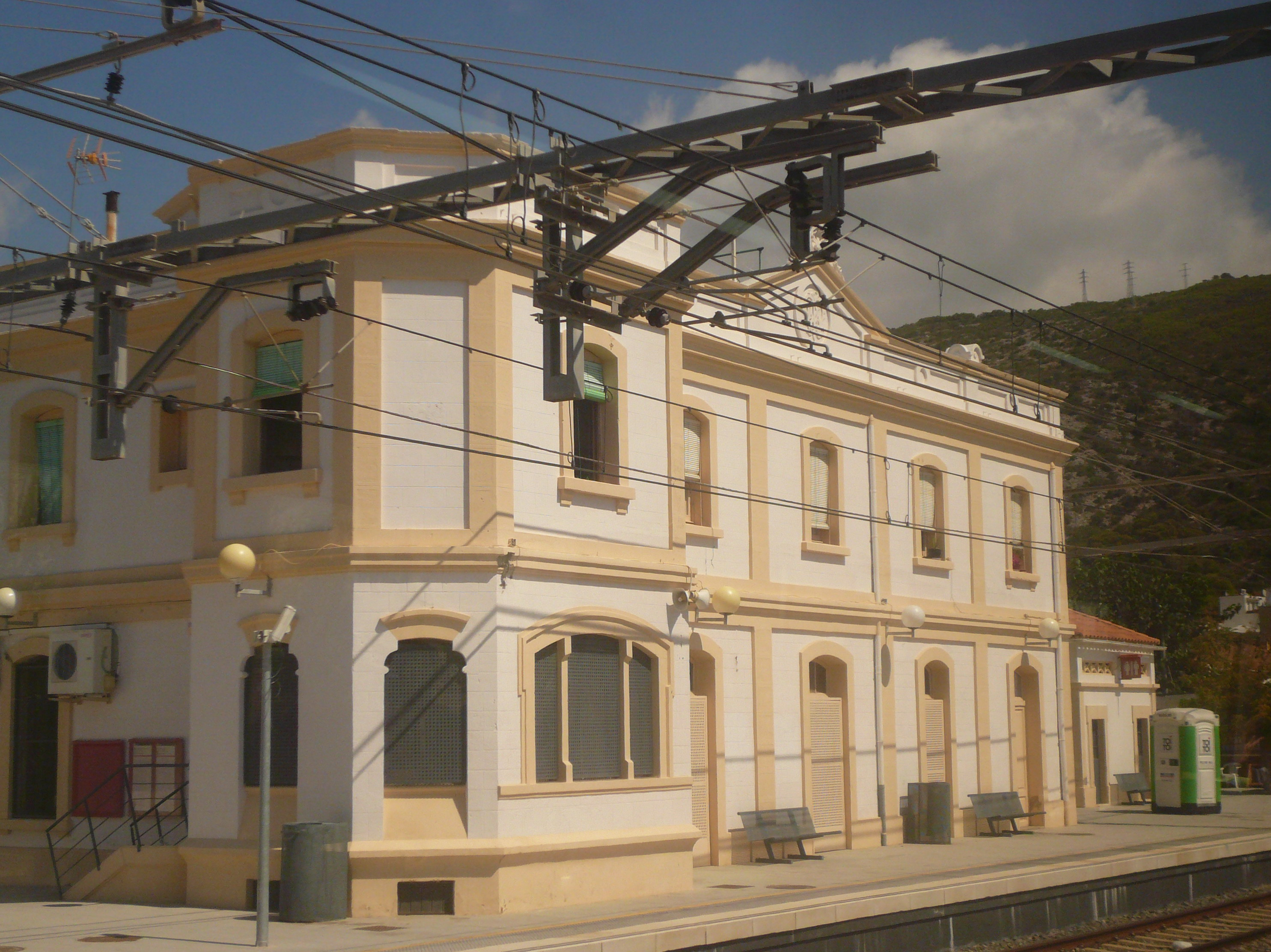 Estació de Garraf, vista des del tren.